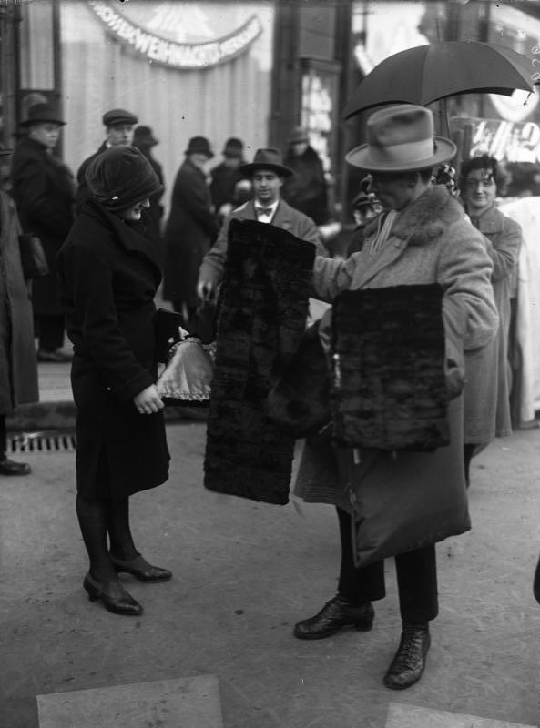 Pelzverkauf Unter den Linden in Berlin